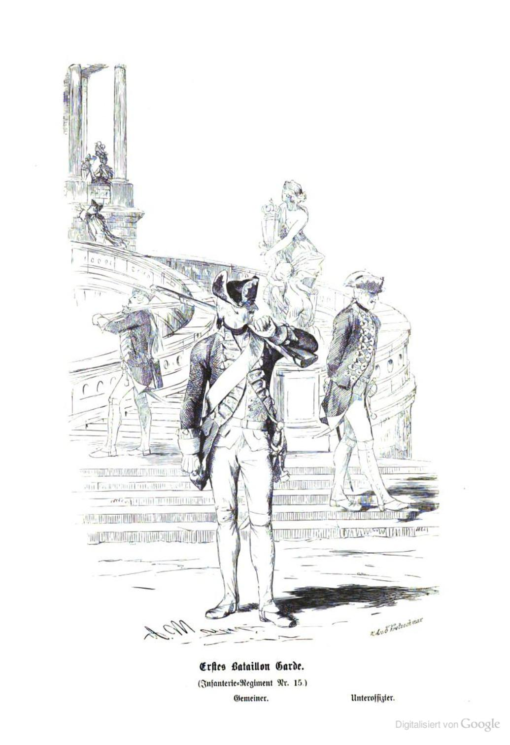 preußisches Garde - Infanterie-Regiment Nr.15 - Uniformen um 1760